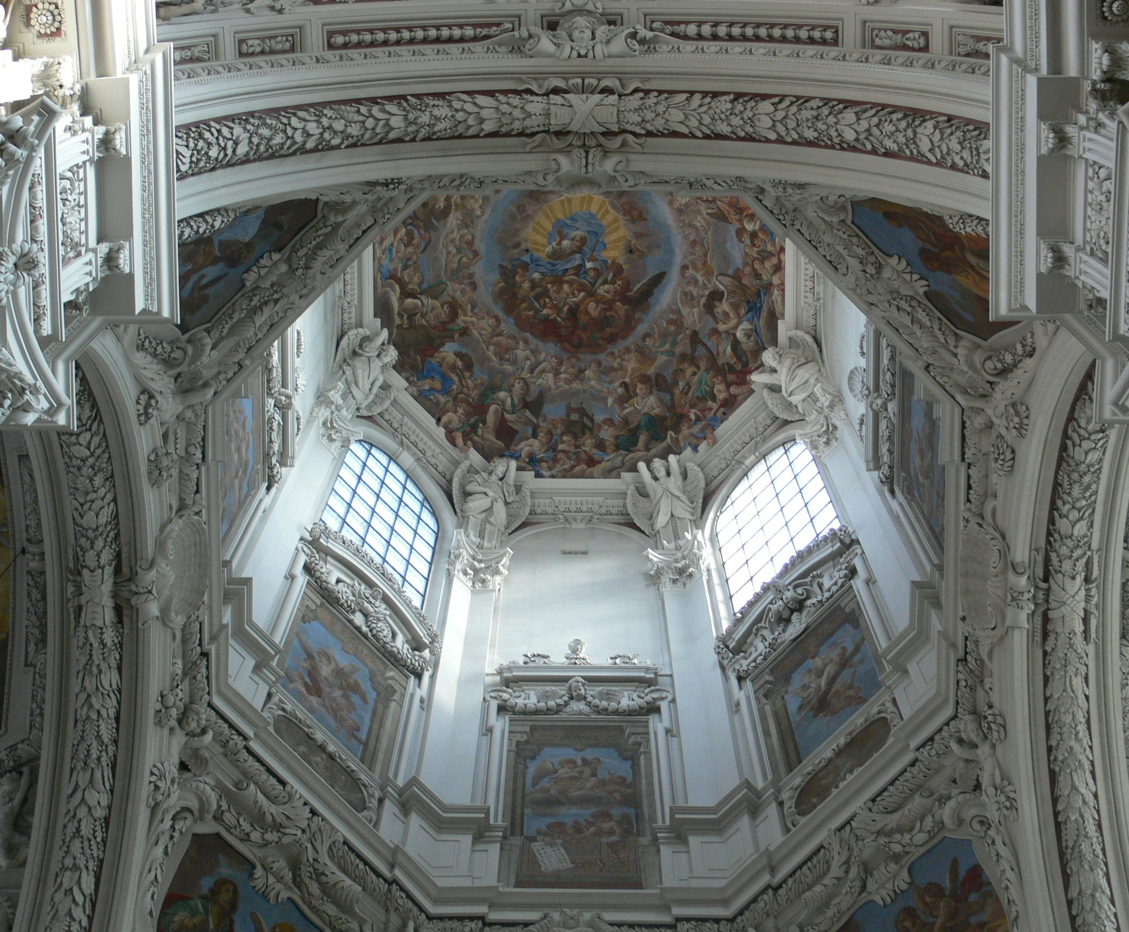 Passau, Dom St. Stephan Blick in die Kuppel